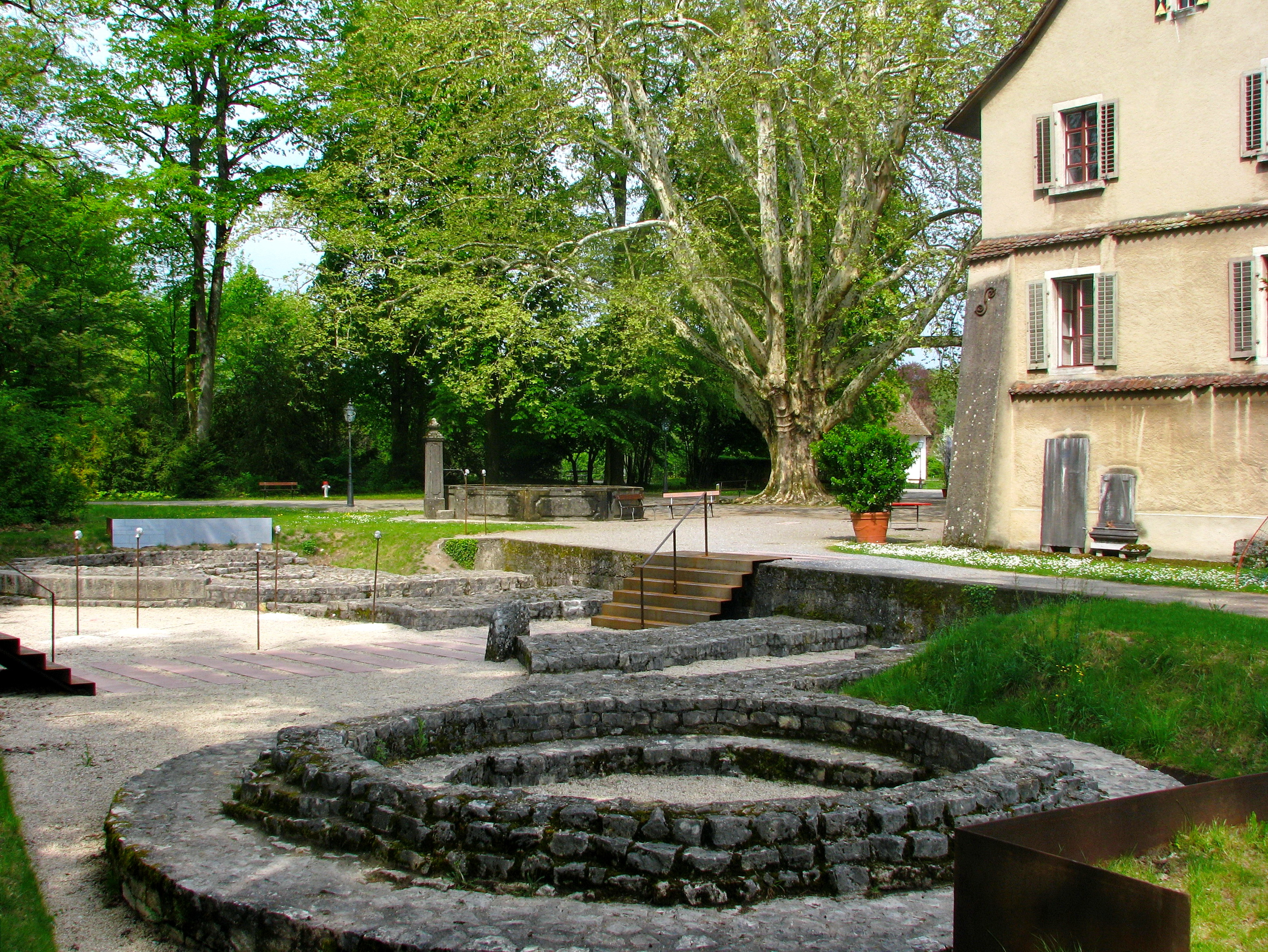 Königsfelden respectively Legionärspfad in Windisch (Switzerland)